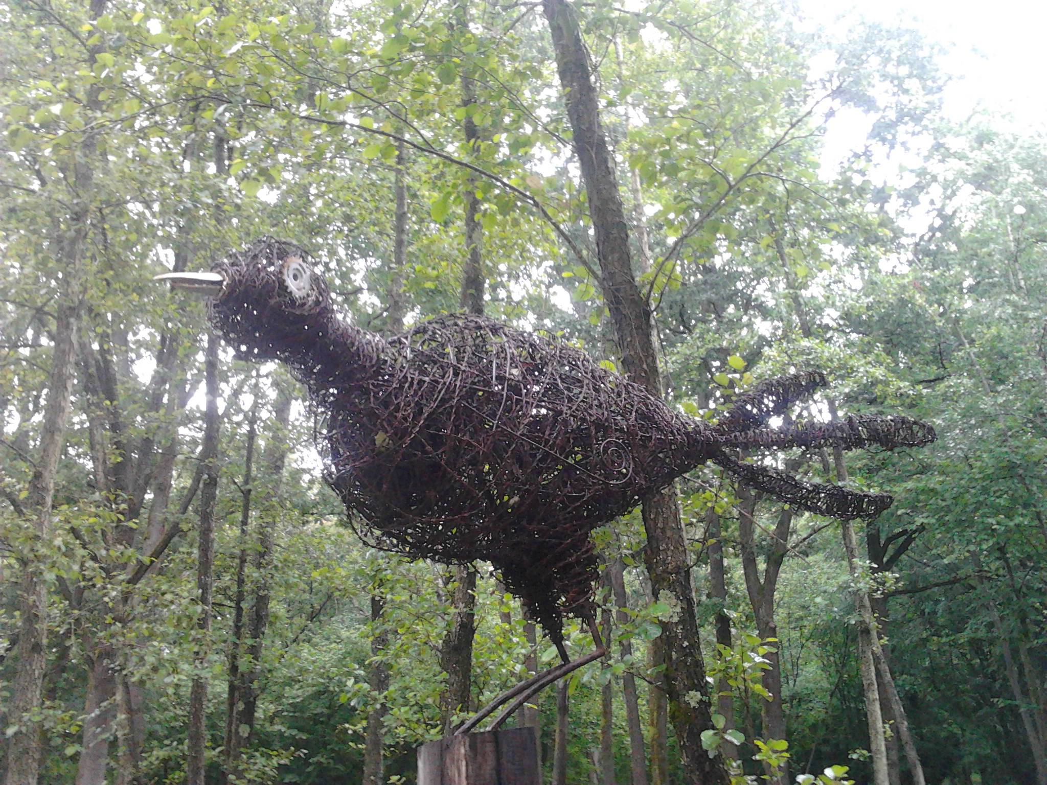 A Bödeháza és Zsitkóc közti Barátság park egyik alkotása. A madarat ábrázoló szobor szögesdrótból készült.